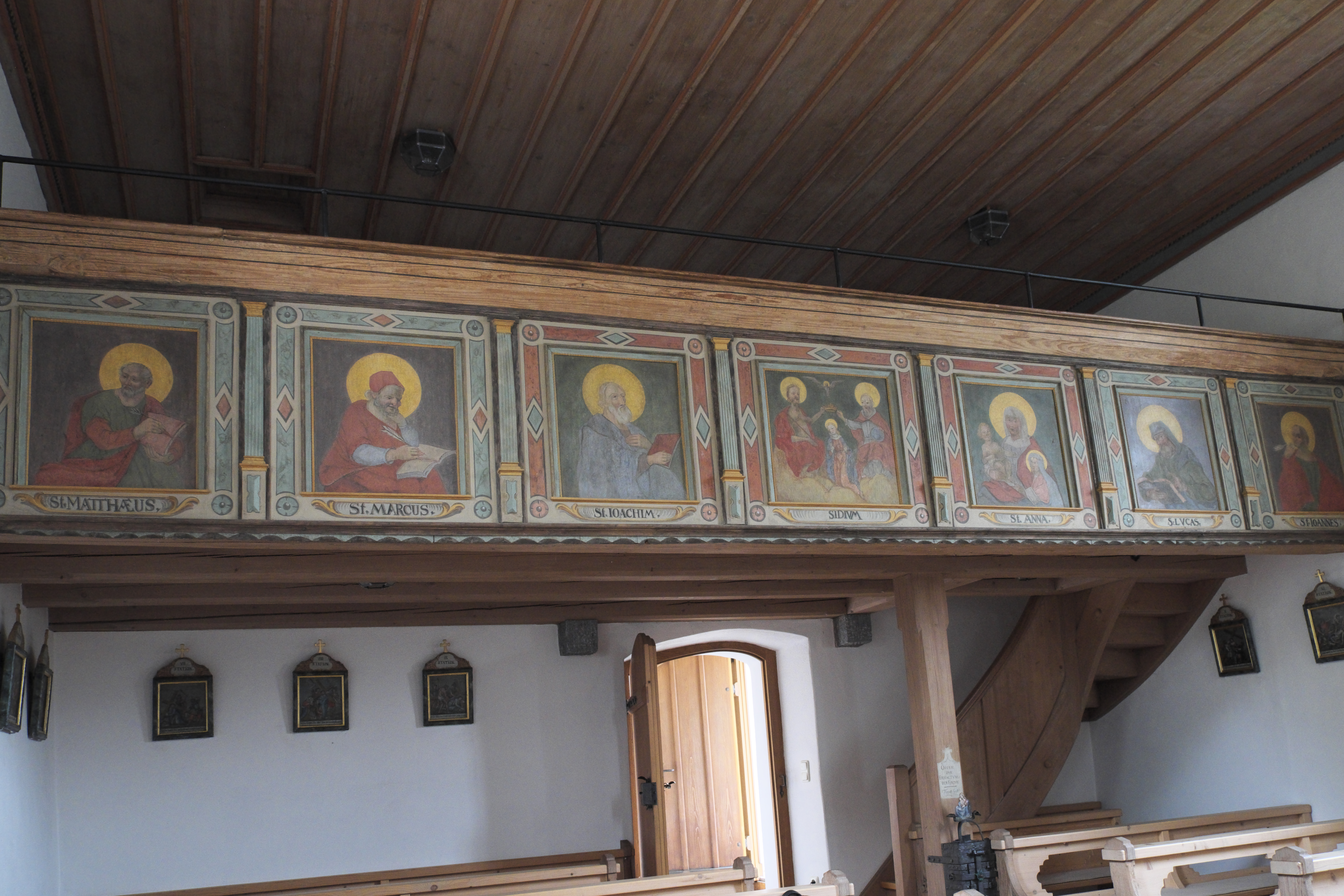 Katholische Filialkirche St. Nikolaus in Oberkirch (Füssen) im Landkreis Ostallgäu (Bayern/Deutschland), Emporenbrüstung mit bemalten Feldern, Mitte des 17. Jahrhunderts; Darstellung: Evangelisten, heiliger Joachim, heilige Anna und Marienkrönung